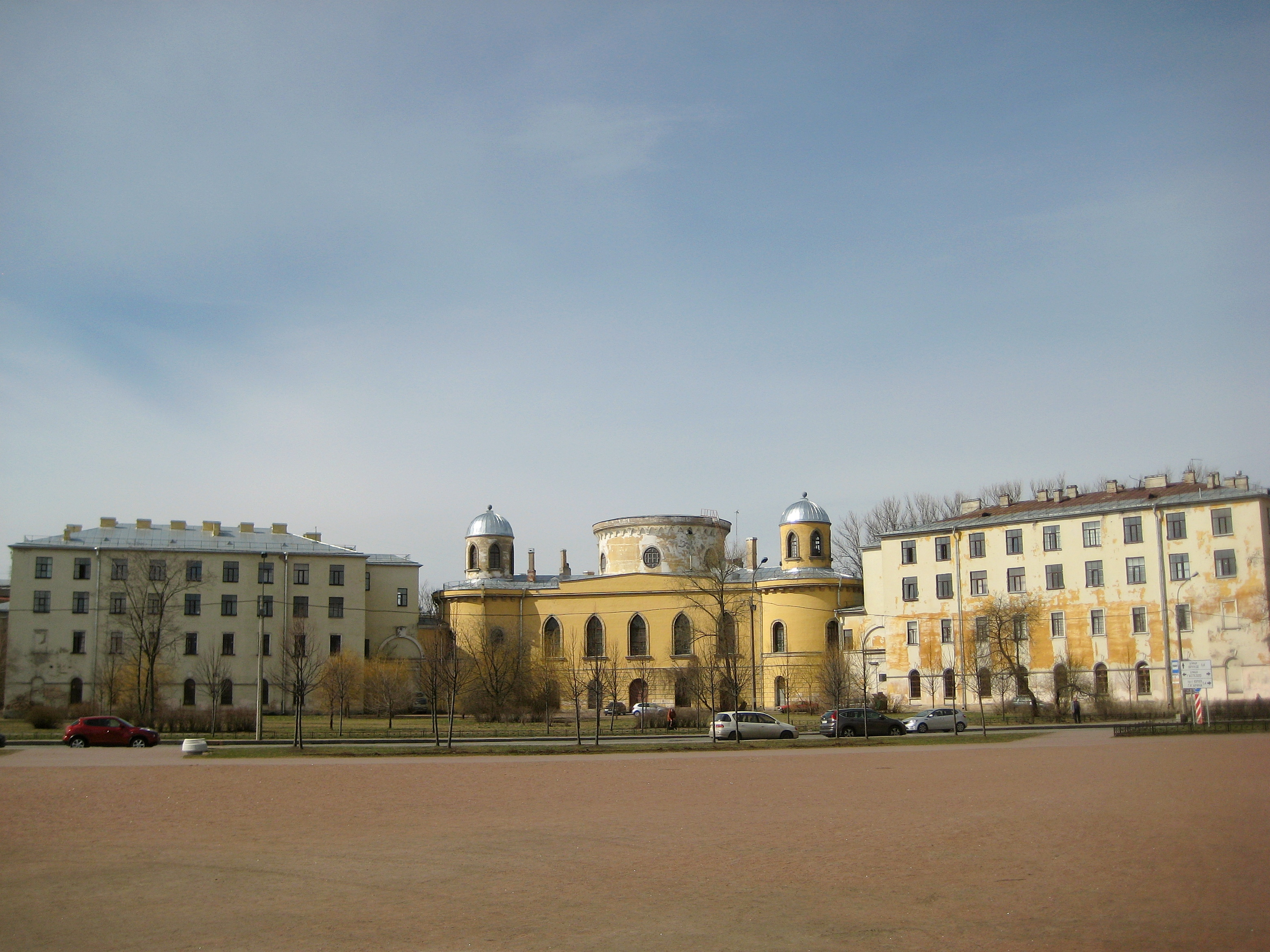 Чесменский дворец с флигелями (Санкт-Петербург и Лен.область, Санкт-Петербург, улица Гастелло, 15)